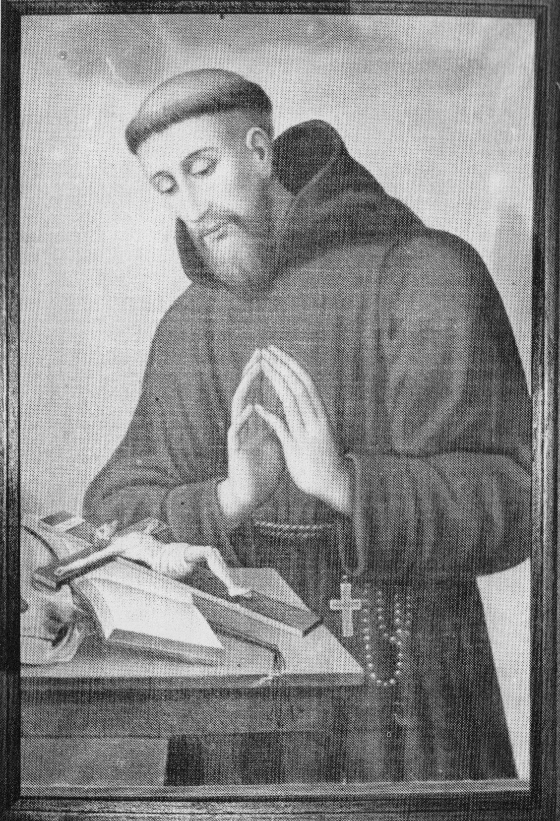 Porträt-Gemälde des Paters Stanislaus (Michael Saurbeck) aus Wutöschingen. Verwendung für das Porträt des Paters. Das Original befindet sich im Pfarrsaal der Katholischen Kirche in Wutöschingen. Nach Auskünften vor Ort soll das Gemälde aus dem 19. Jahrhundert stammen. Der Künstler ist nicht bekannt - eine Ableben in der Zeit vor 100 Jahren ist wahrscheinlich, doch nicht zu sichern. In der Literatur ist es in dem Buch: Helmut Maurer/Hans Ruppaner: Pfarrei St. Johannes d. T. Schwerzen, Zum 200. Jubiläum der Pfarrei Schwerzen, 1992, mit dem Bildvermerk: Archiv Gemeinde Wutöschingen versehen. Das Archiv wurde bei einem Rathaus-Neubau aufgelöst, doch berührt dies nicht die rechtliche Zuständigkeit der Gemeinde. Deshalb erfolgt die Genehmigung zur Freigabe in Stellvertretung der Gemeinde durch Hauptamtsleiter Rainer Stoll.